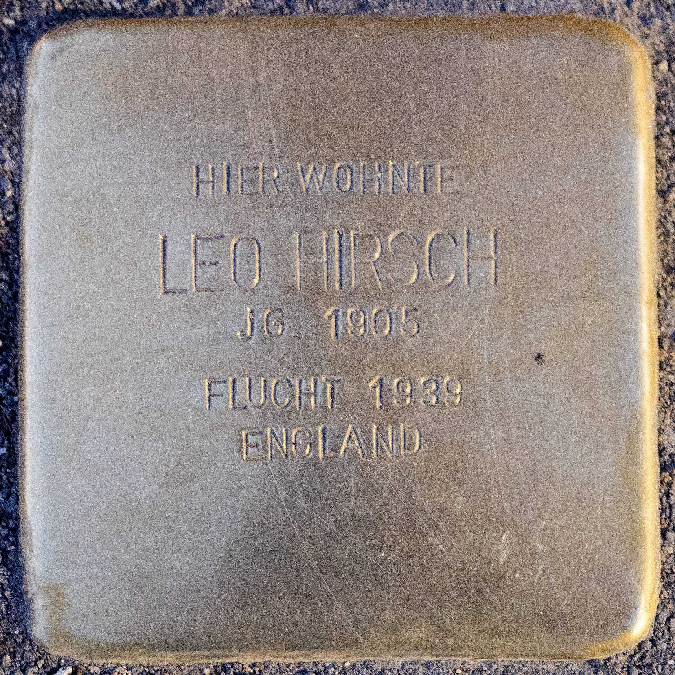 2016 11 25 Stolpersteine Kempen Hirsch Leo